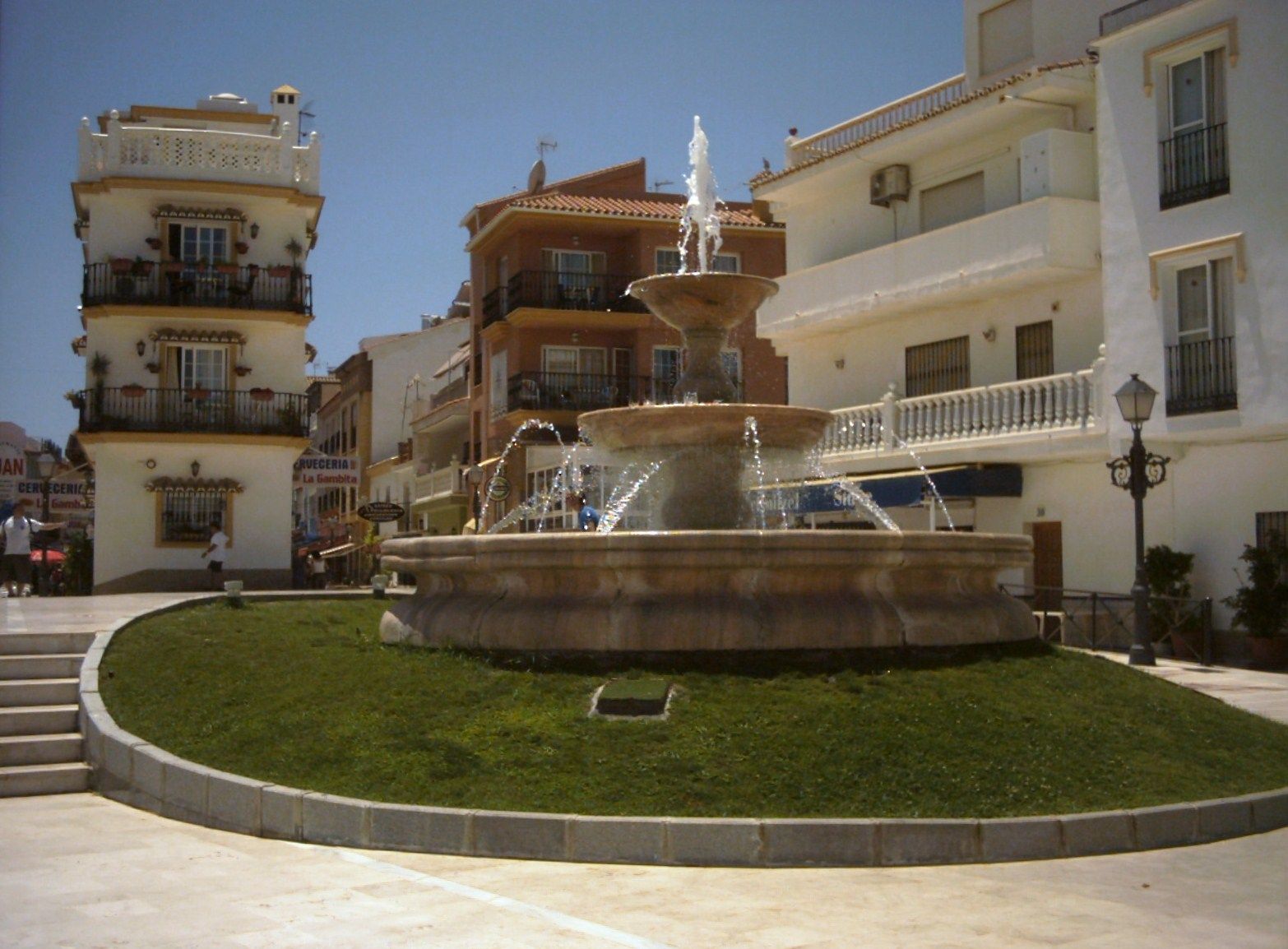 29620 Torremolinos, Málaga, Spain